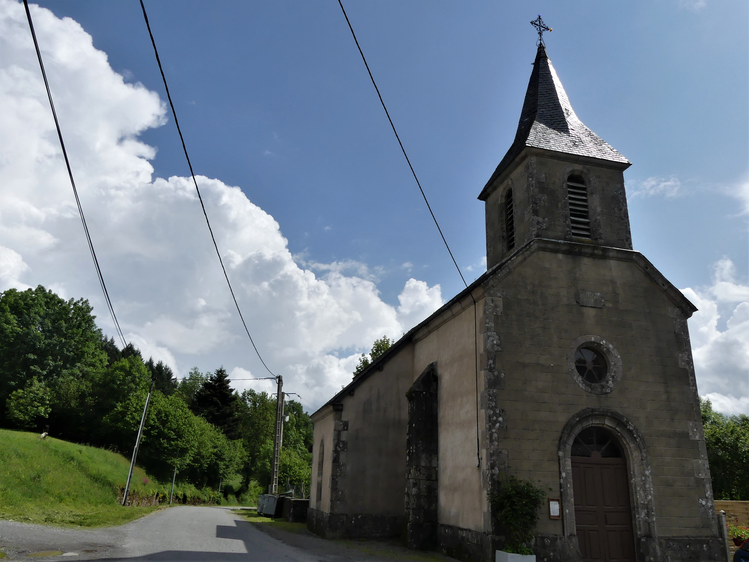 L'église Saint-Pierre-Saint-Paul du Mas-d'Artige, Creuse, France.